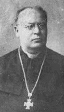 Josef Brenner (1852 - 1924), Český římskokatolický kněz.